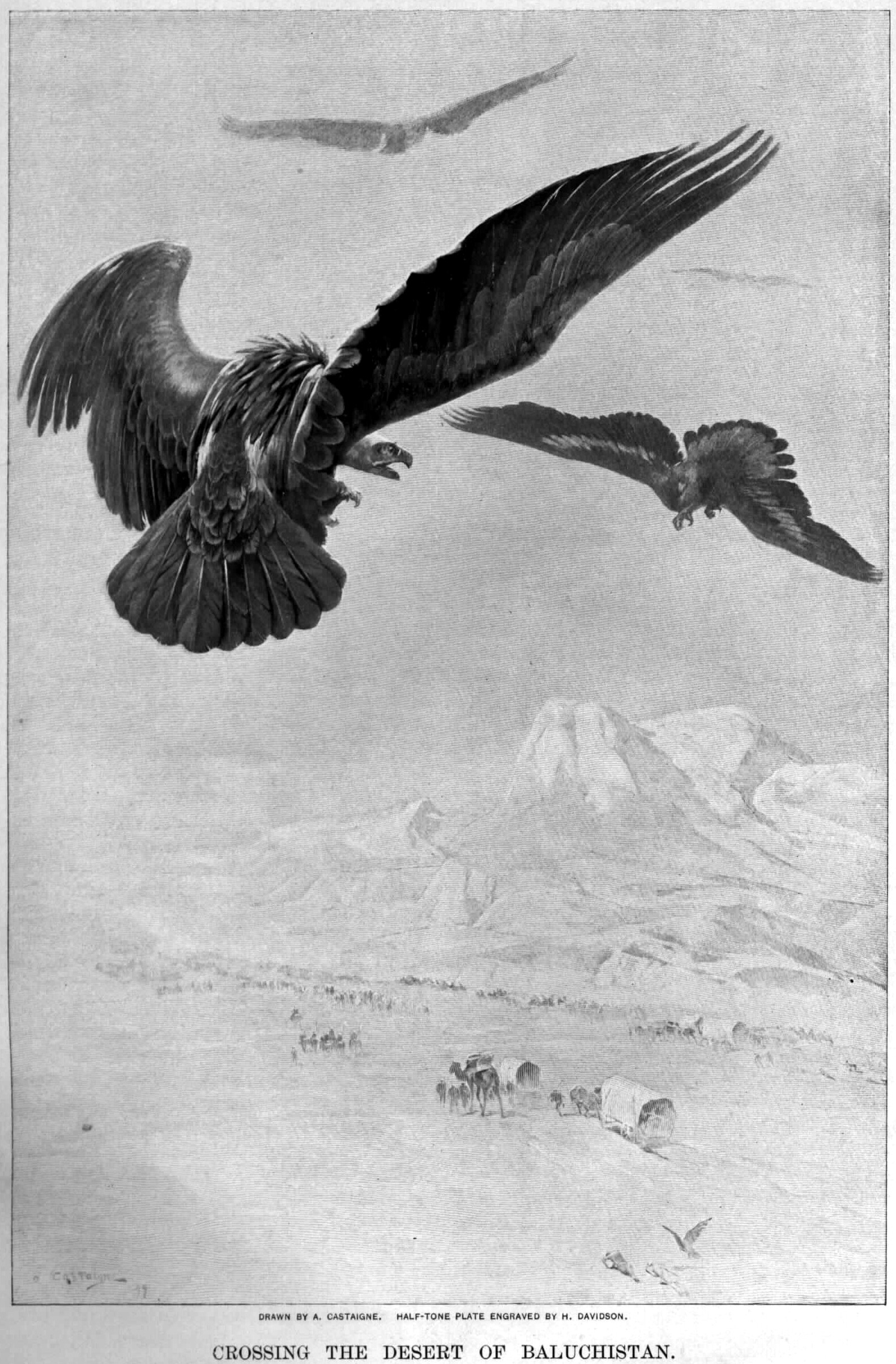 Alexander old drawings